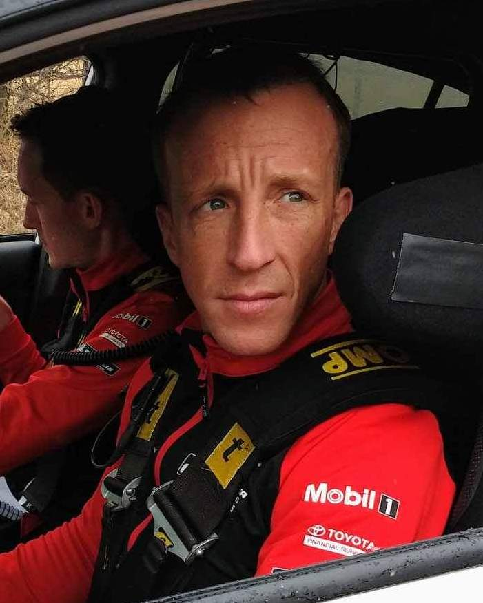 Kris Meeke durant les reconnaissances du Rallye Monte-Carlo 2019.